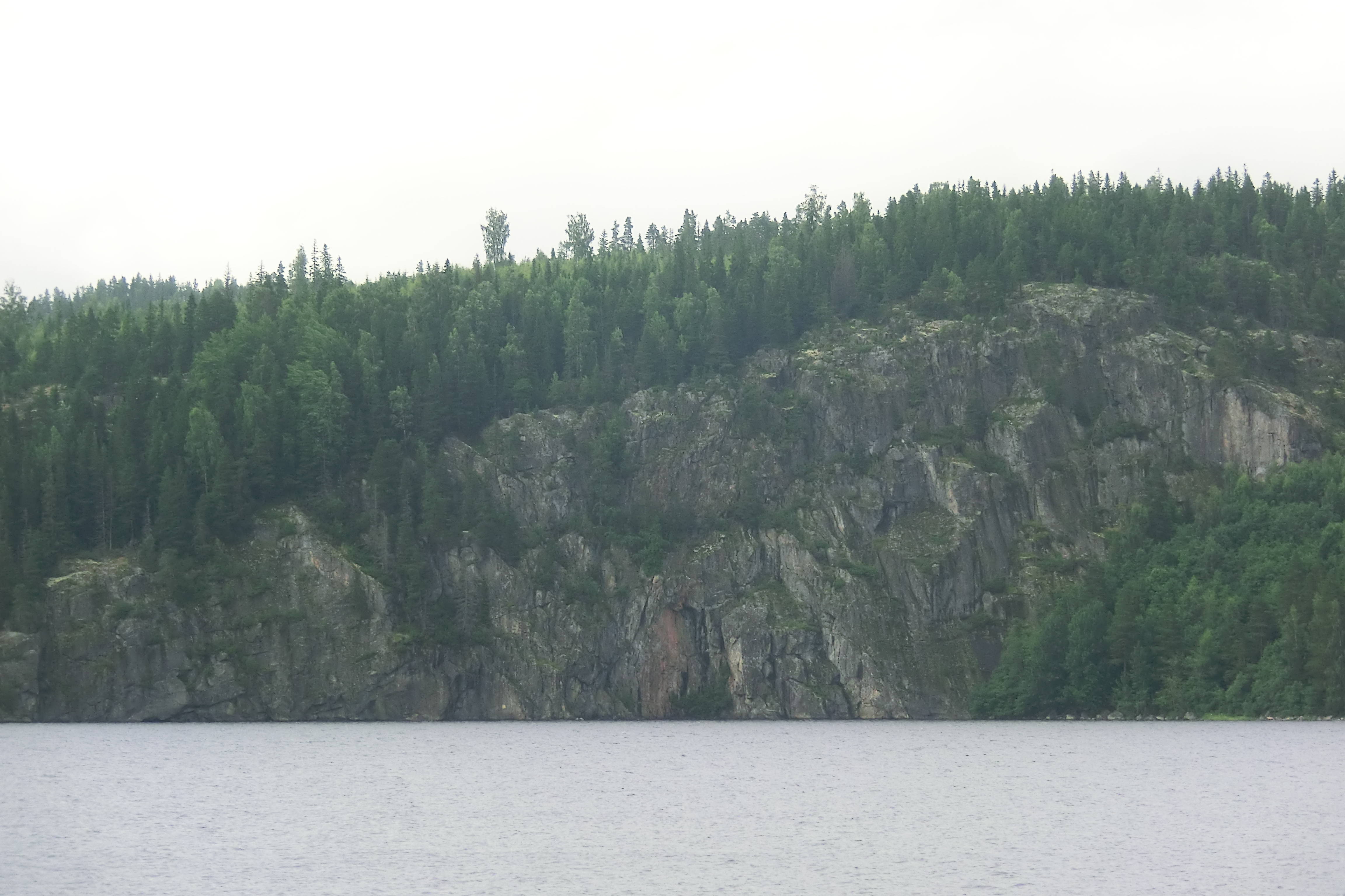 Ättestupan i Näs: Ristningar daterade 1921-78